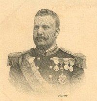 Karel van Portugal - Kaart is ouder dan 70 jaar dus geen copyright